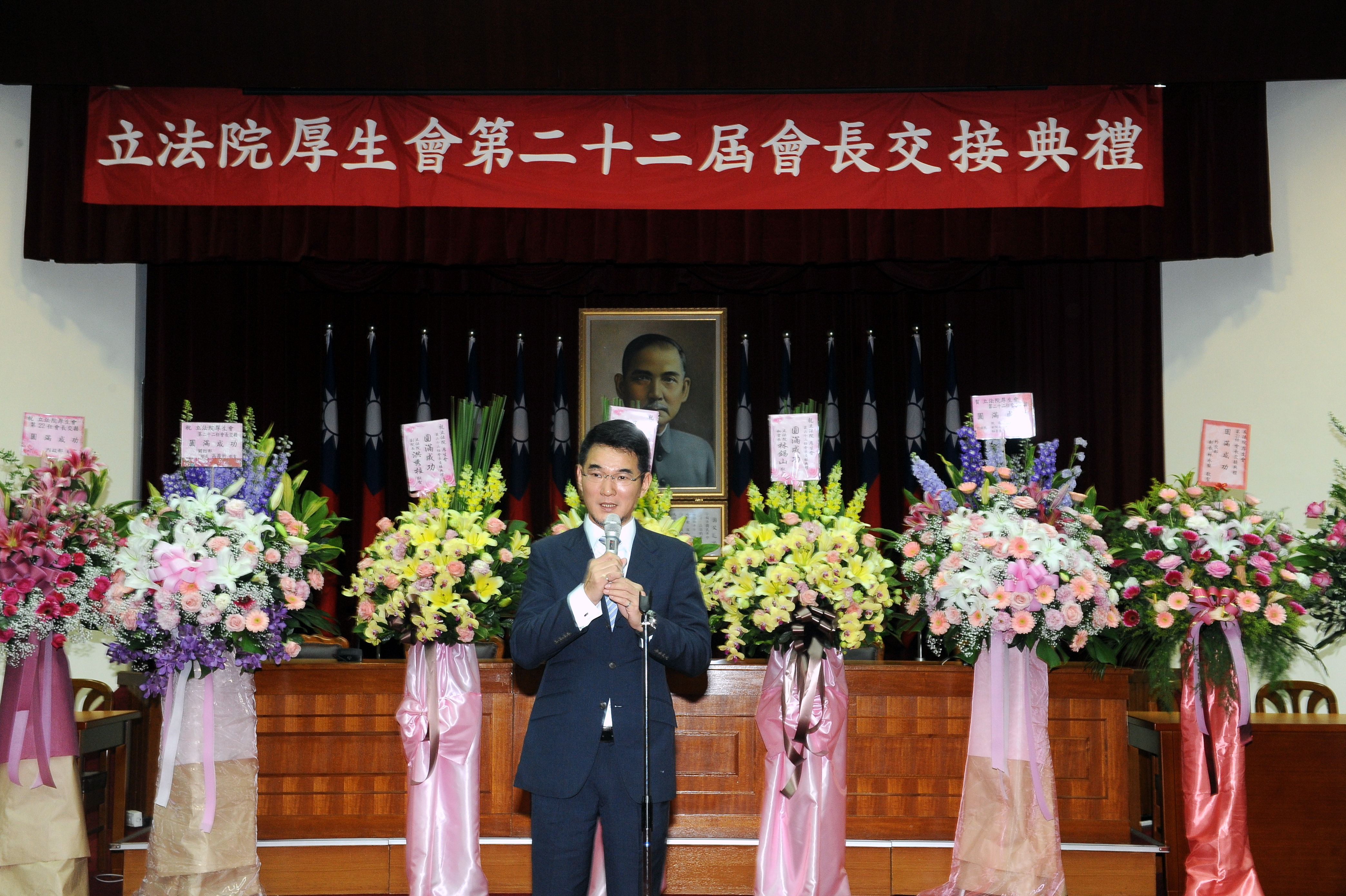 厚生會交接典禮